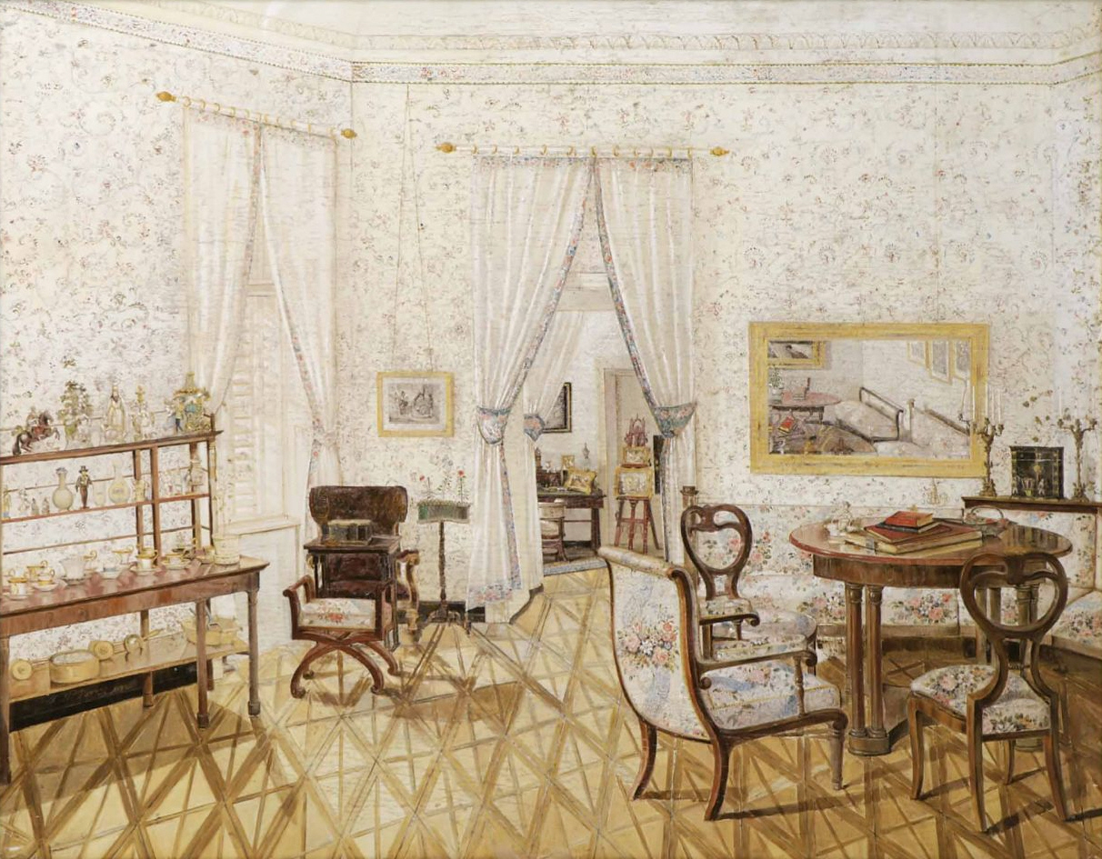 Biedermeier-Interieur (evtl. der bischöflichen Residenz in Pécs/Fünfkirchen, Ungarn), Öl auf Holz. Signiert und datiert "1842". 41 x 52 cm